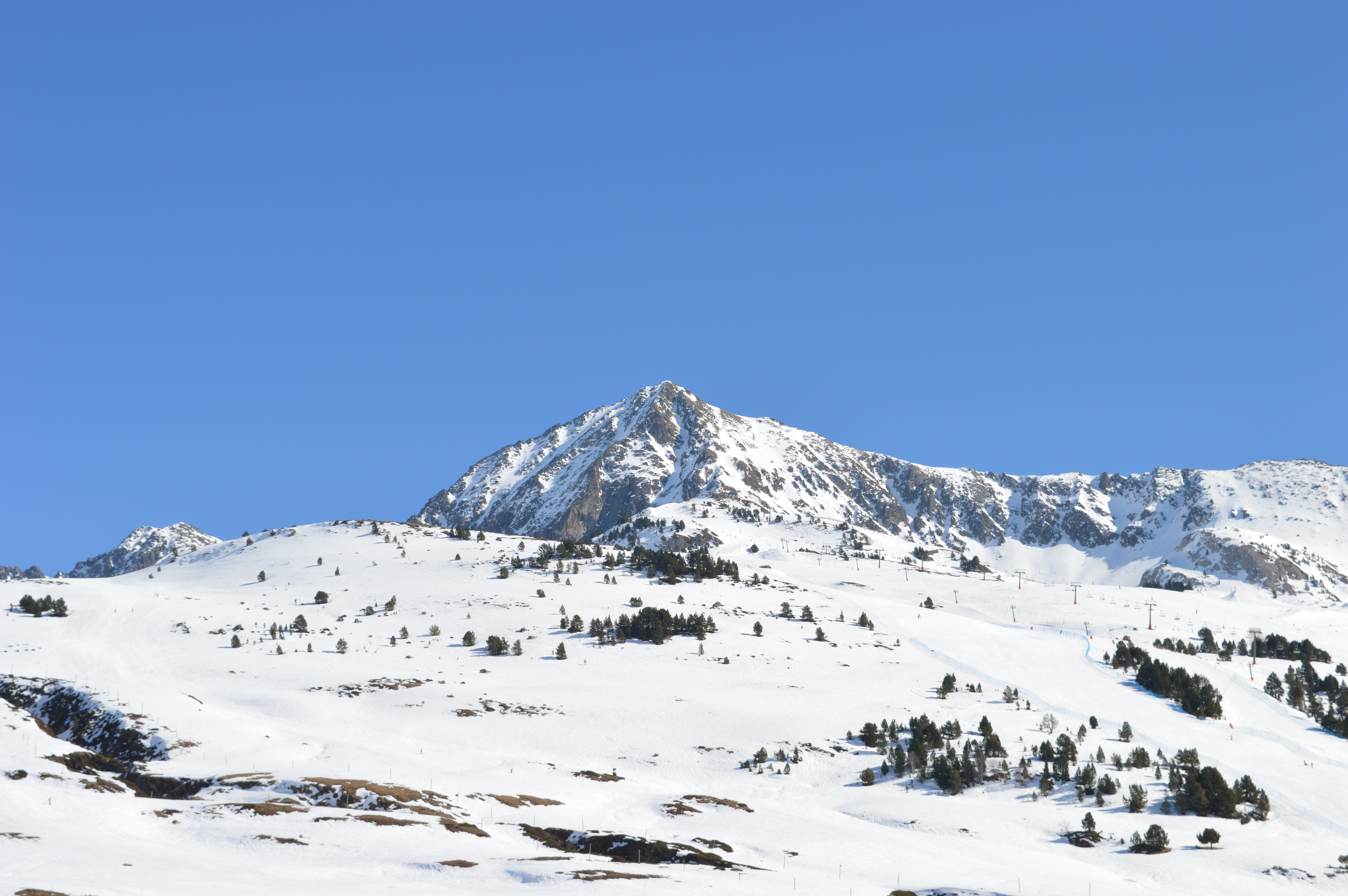 Tuc de Vacivèr